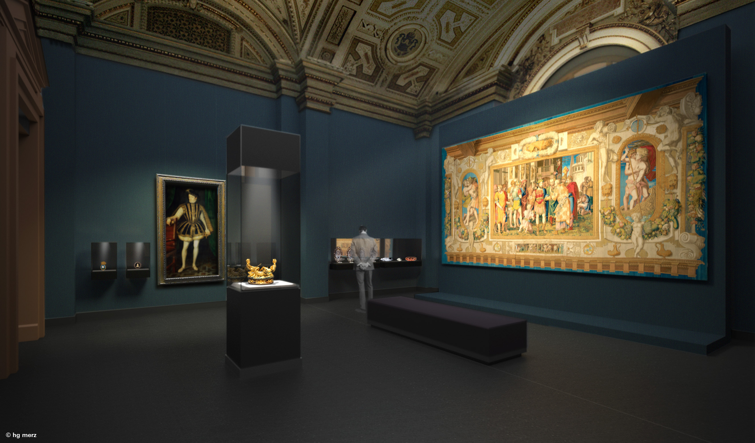 Visualisierung Kunstkammer Wien ab 2013